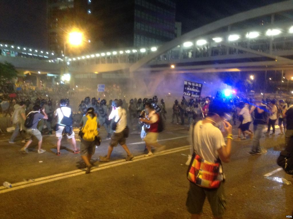 香港警方使用催淚彈驅散佔中抗議人群